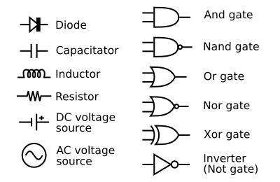 Common electronic circuit elements.